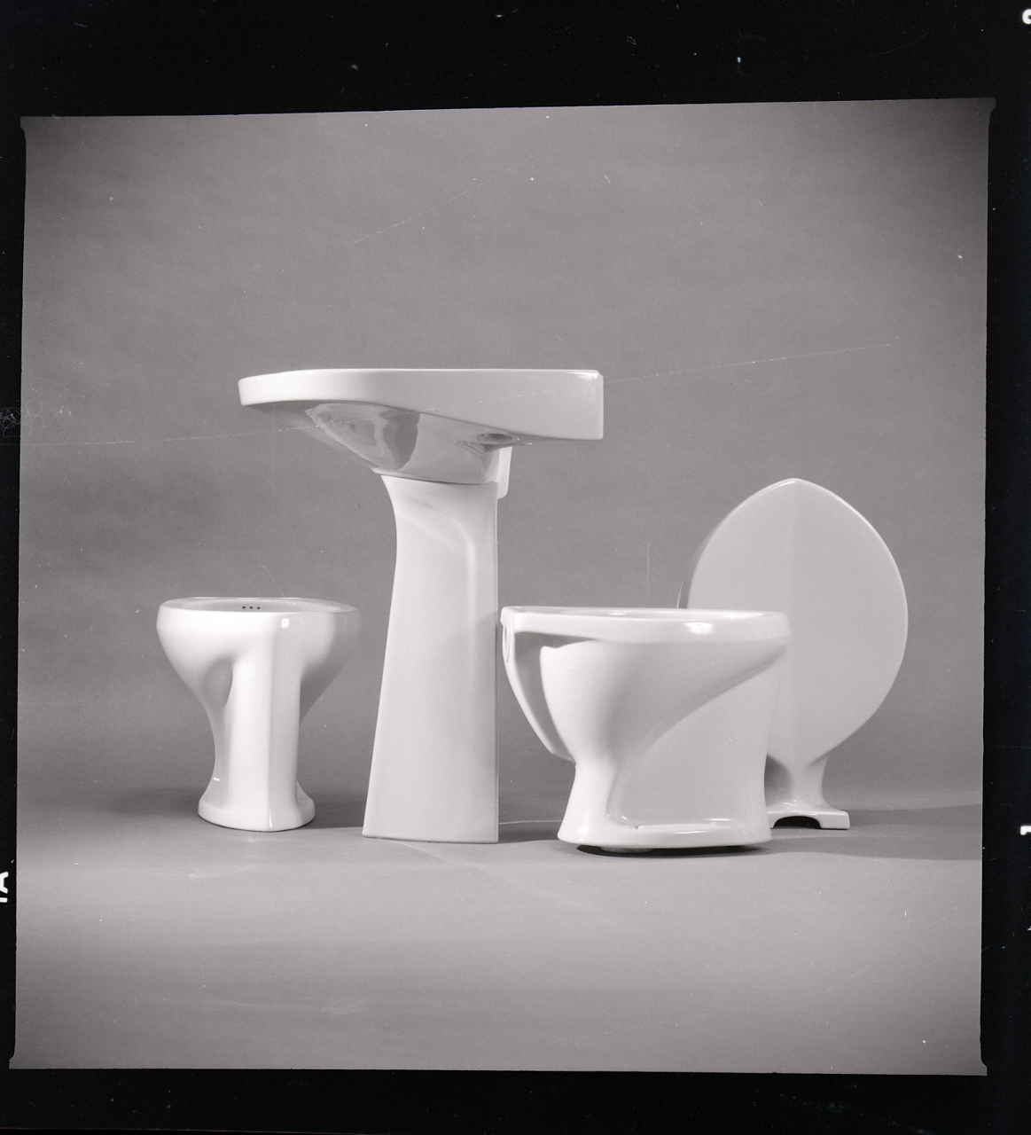 Servizio fotografico : Milano, 1965 / Paolo Monti. - Buste: 5, Fototipi: 9 : Negativo b/n, gelatina bromuro d'argento/ pellicola ; 6x6. - ((Serie costituita da 5 buste sciolte di negativi identificati con i nn.: 11921, 11922, 11923, 11924, 11925. - La suddetta serie è contenuta nella scatola G11501-12000, formato 24x30. - Nell'agenda citata nel campo Fonti in corrispondenza degli estremi numerici identificativi della serie iscrizione documentaria manoscritta: "eseguite in sala posa dell'azienda". - Fonte: Agenda di Paolo Monti: Monti/ 2/ 6 giugno 1964 - 31 marzo 1966/ 8194-12420 (1964-1966), presso Archivio Paolo Monti